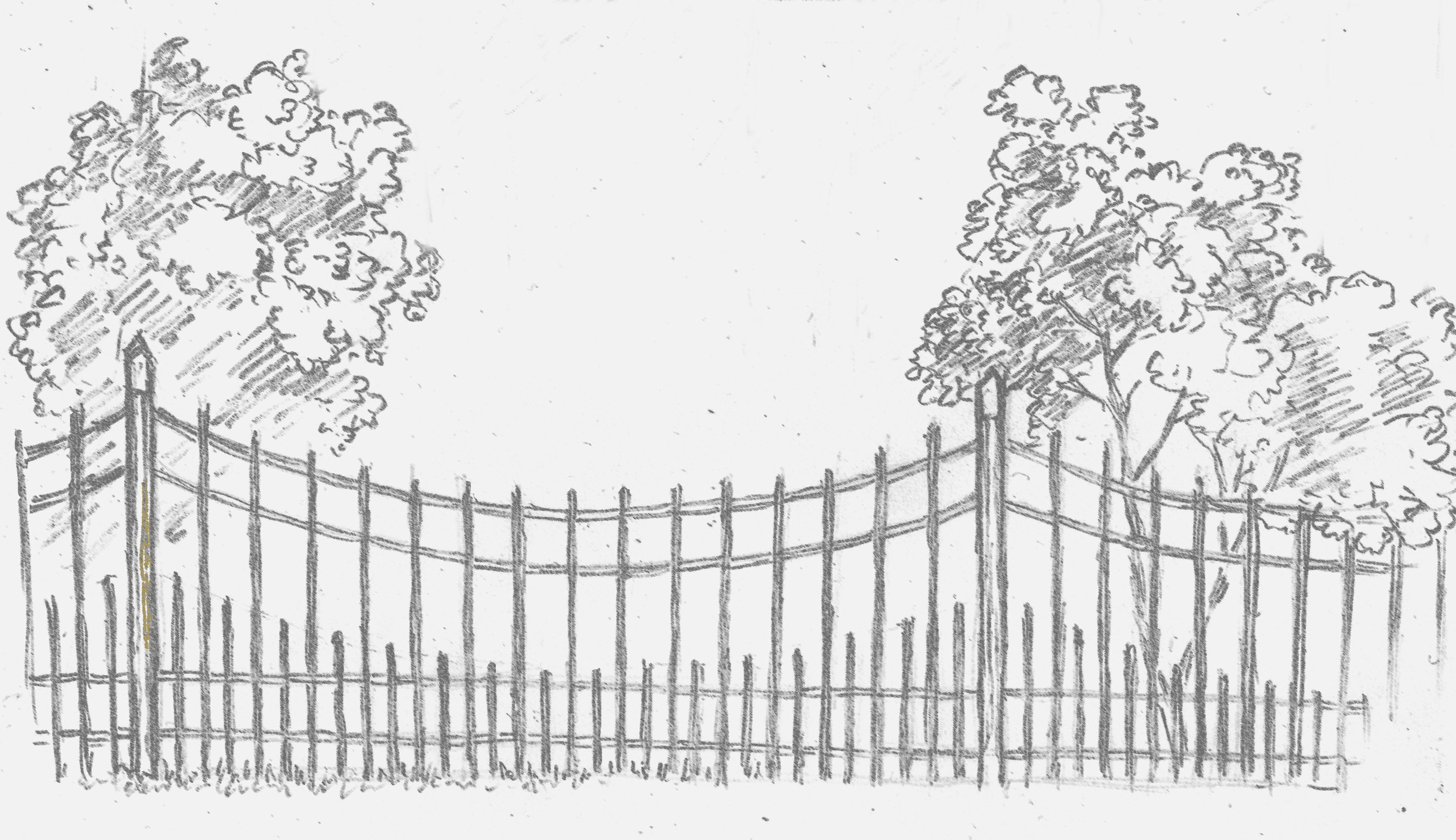 Park Klein-Glienicke, Estaquet um das Matrosenhaus, Nachzeichnung eines Fotos von 1938